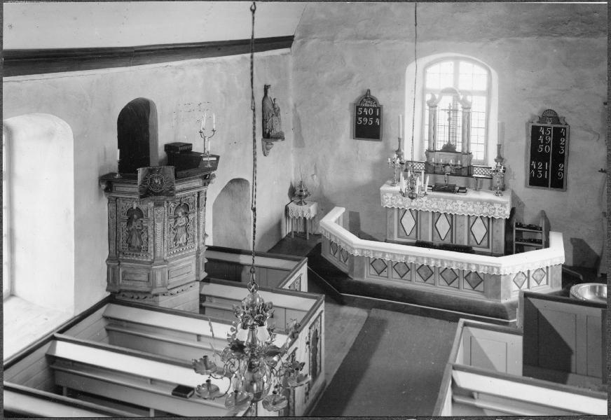 Interiör mot nordöst. Kategori: (02) InteriörerInteriör mot nordöst.